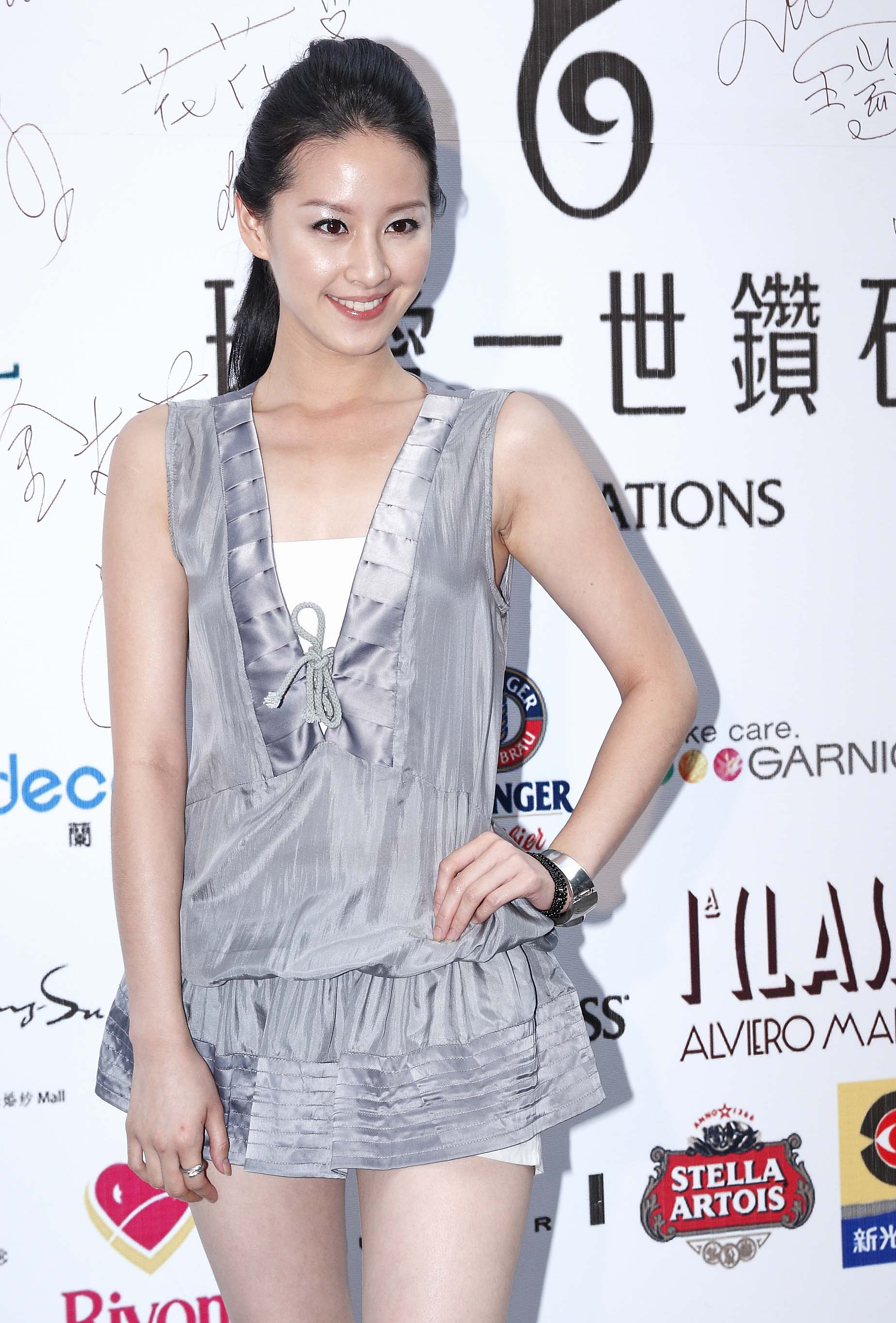 Alice Tzeng